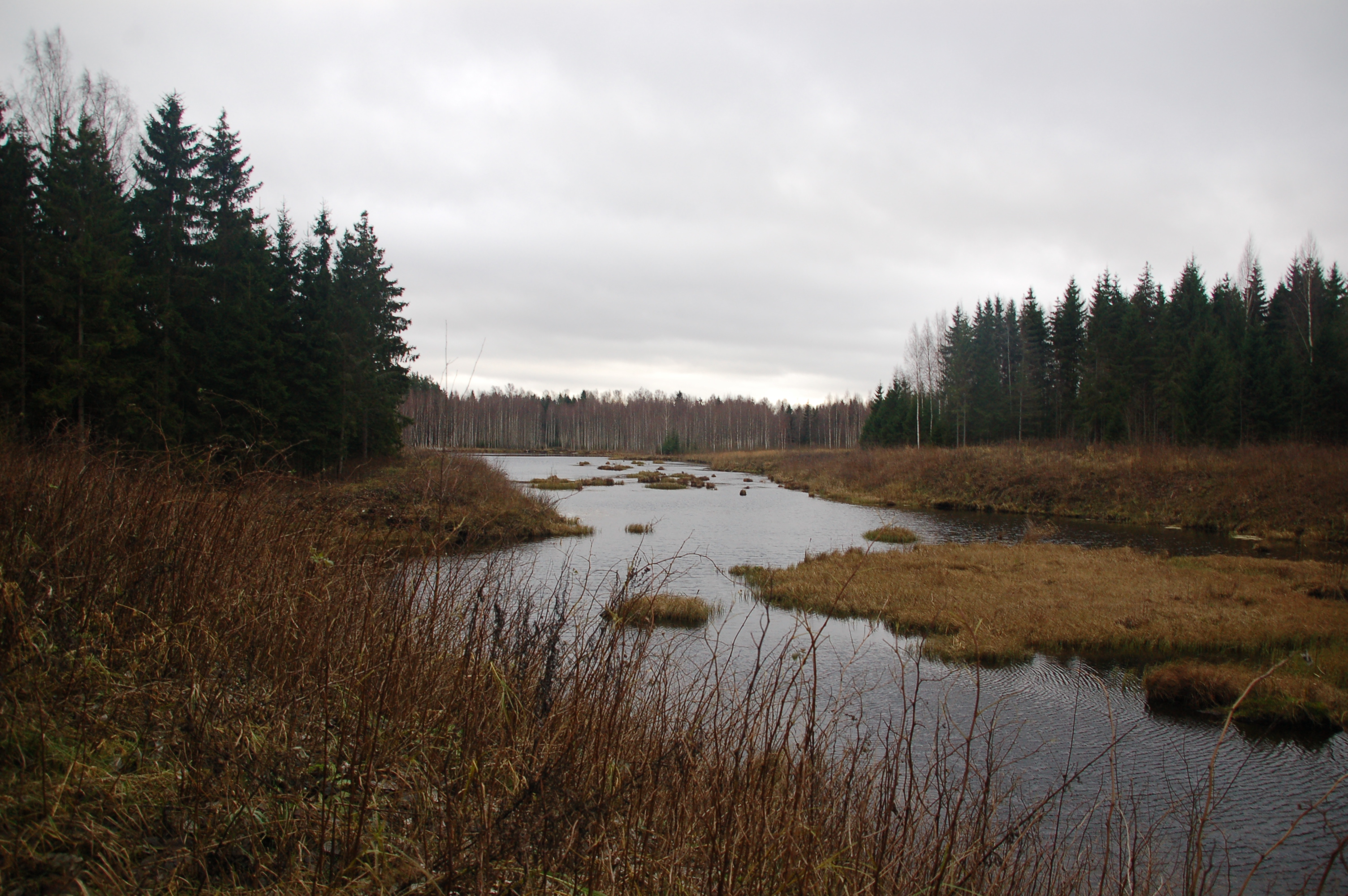 Luke Vanajärv